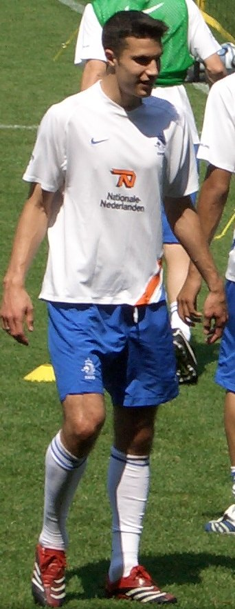 Robin van Persie